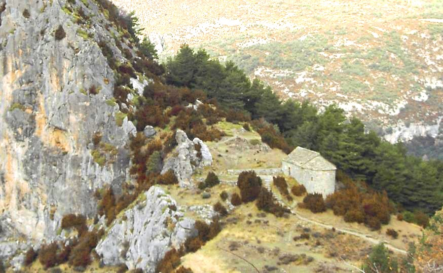 Ermita de San Juan y San Pablo, Tella (Huesca, España).